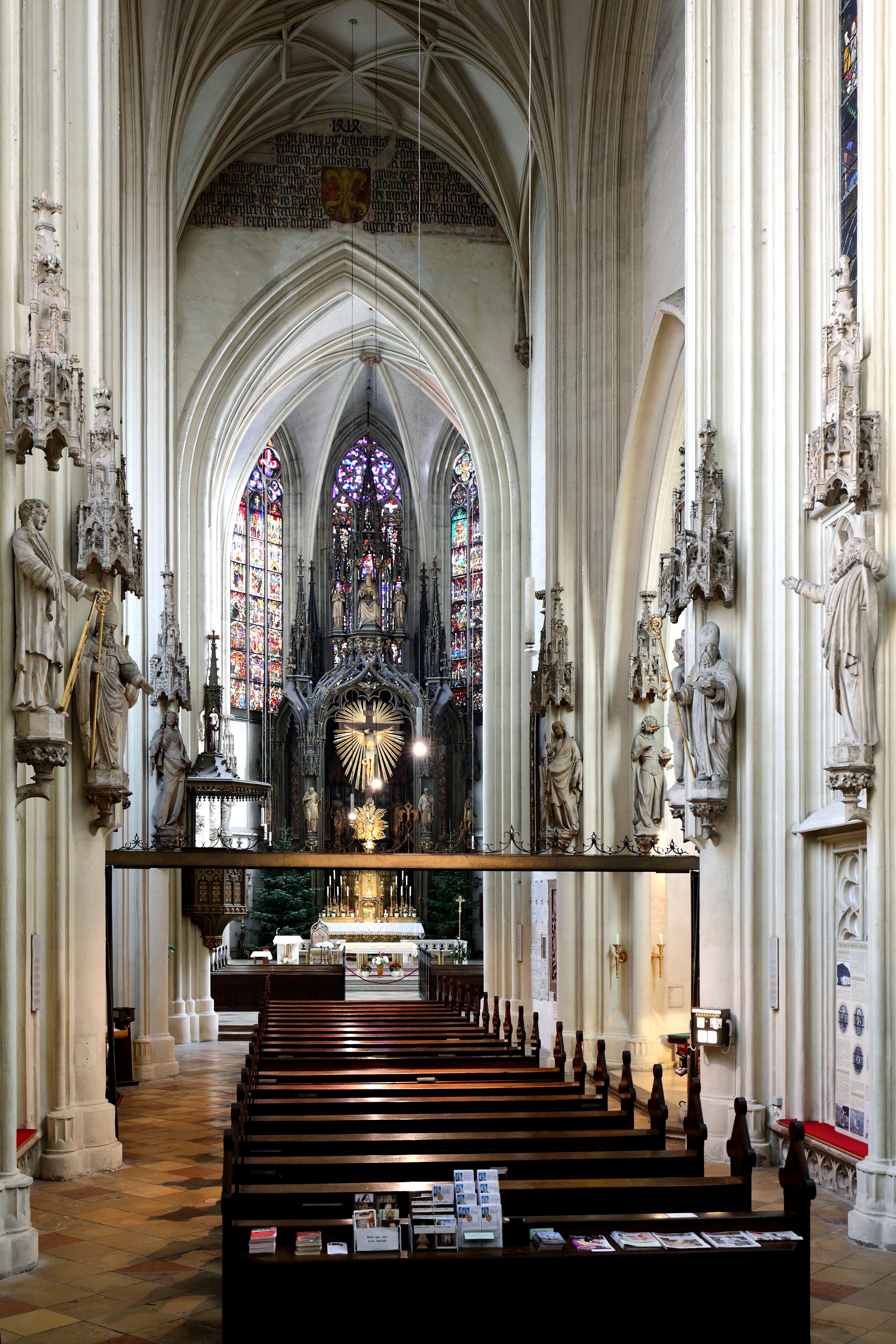 Innenansicht in Richtung Chor der Wiener Pfarrkirche Maria am Gestade.